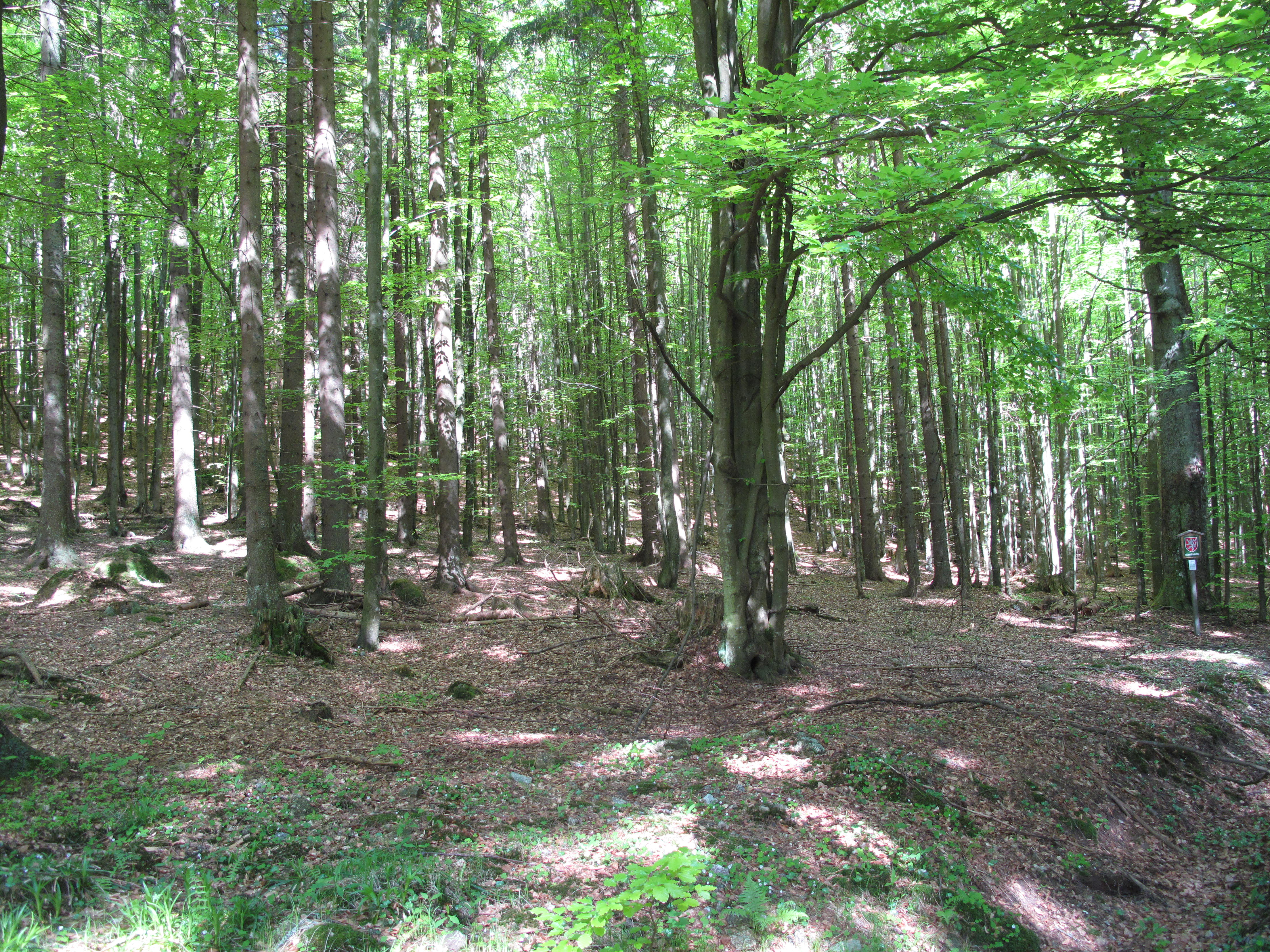 Ulrichov